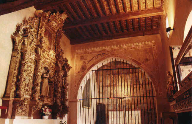 Capilla del Palacio Mirabel, Guadalupe, Cáceres